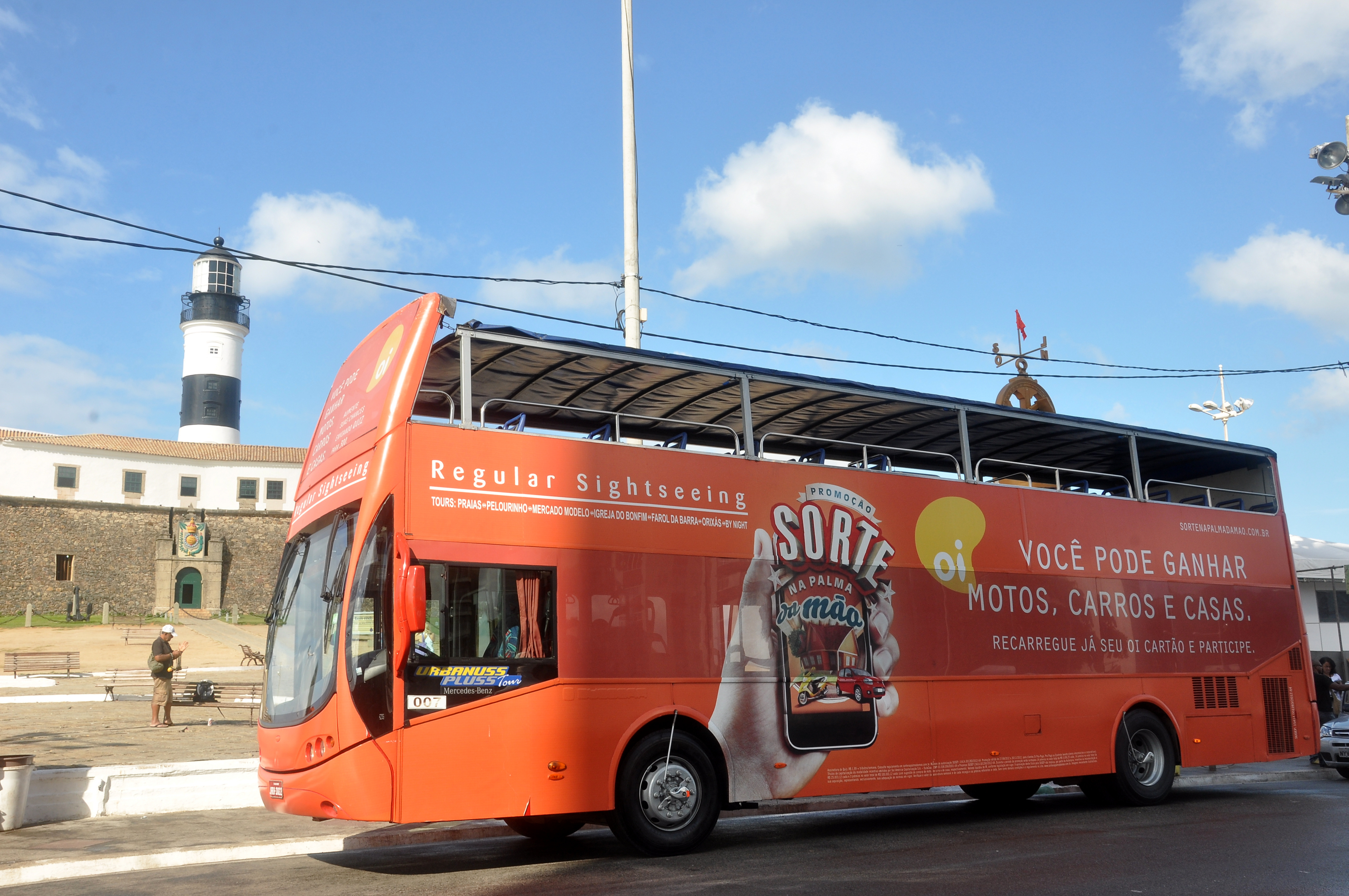 Guias e Monitores do Carnaval 2013 no Salvador Bus - Farol Barra. Foto: Rita Barreto - Setur